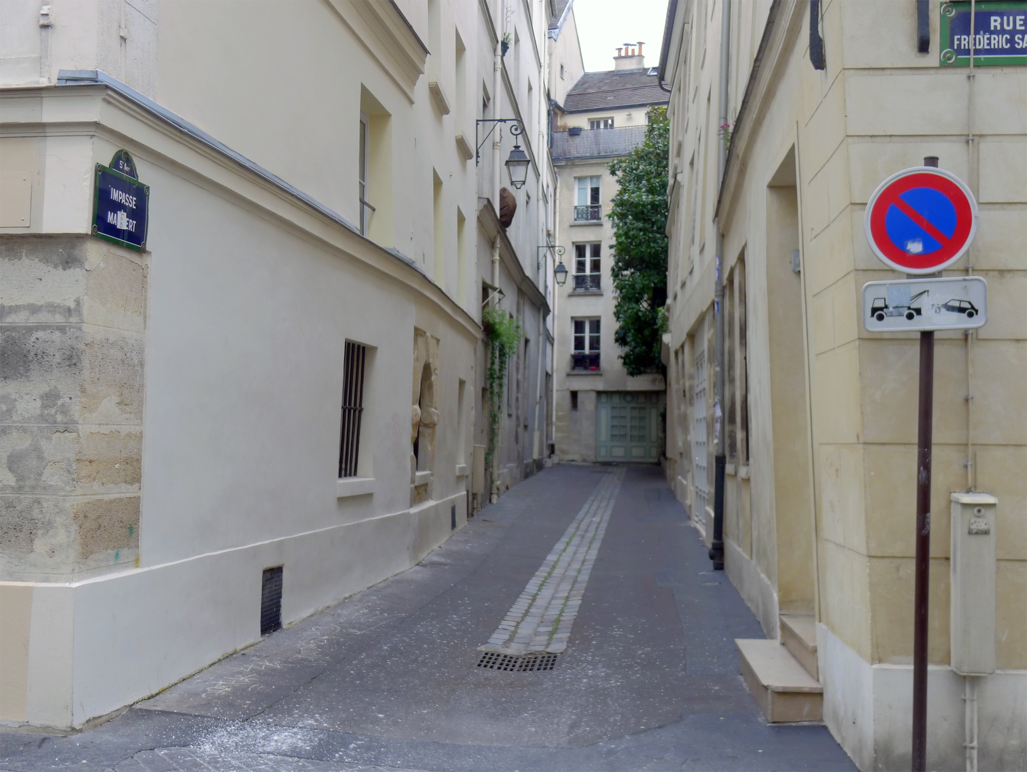 Impasse Maubert - Paris V